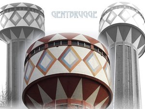 watertoren gentbrugge (zelf gemaakt)